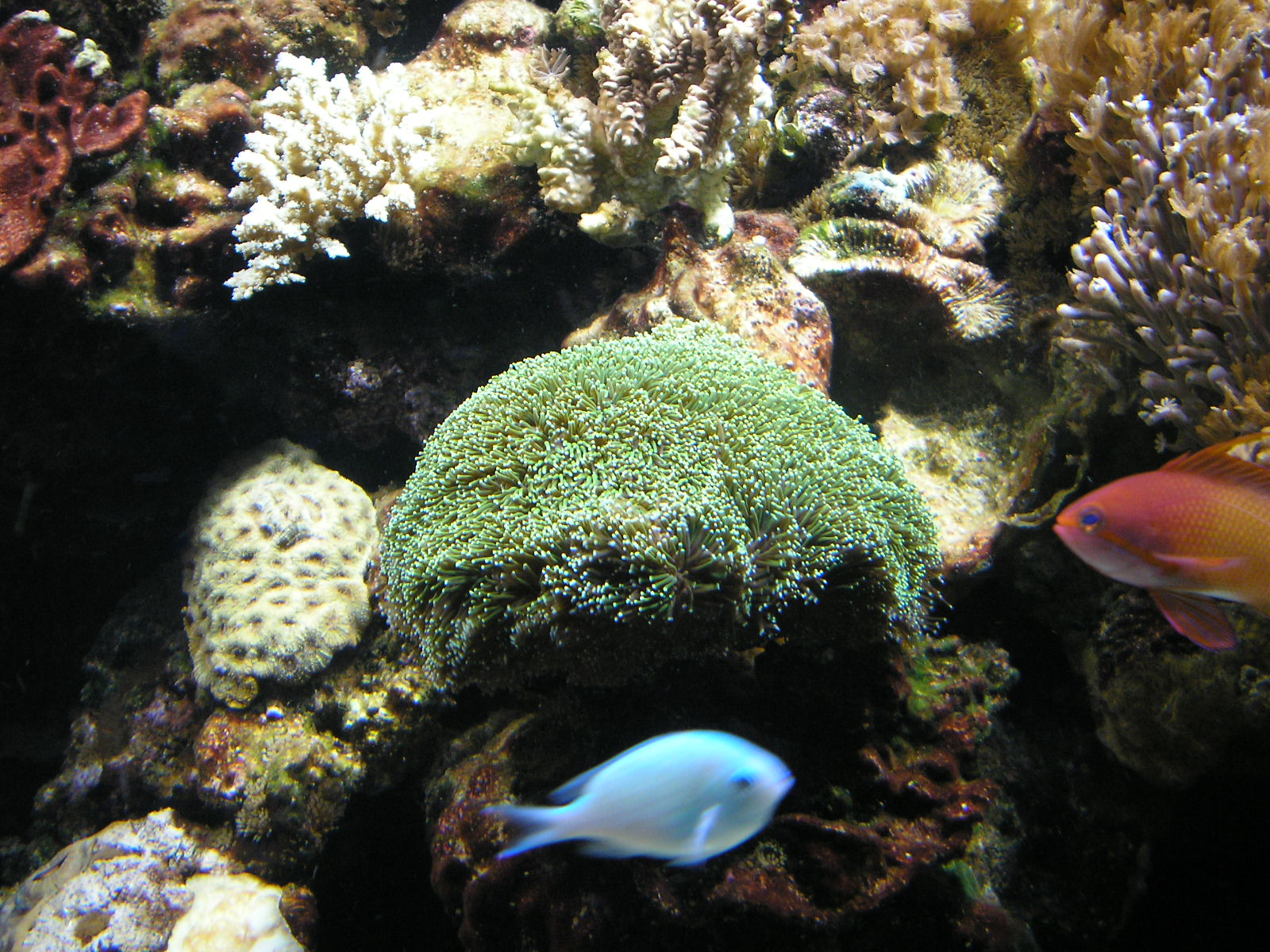 Seeanemone im Vivarium im Naturhistorischen Museum Wien